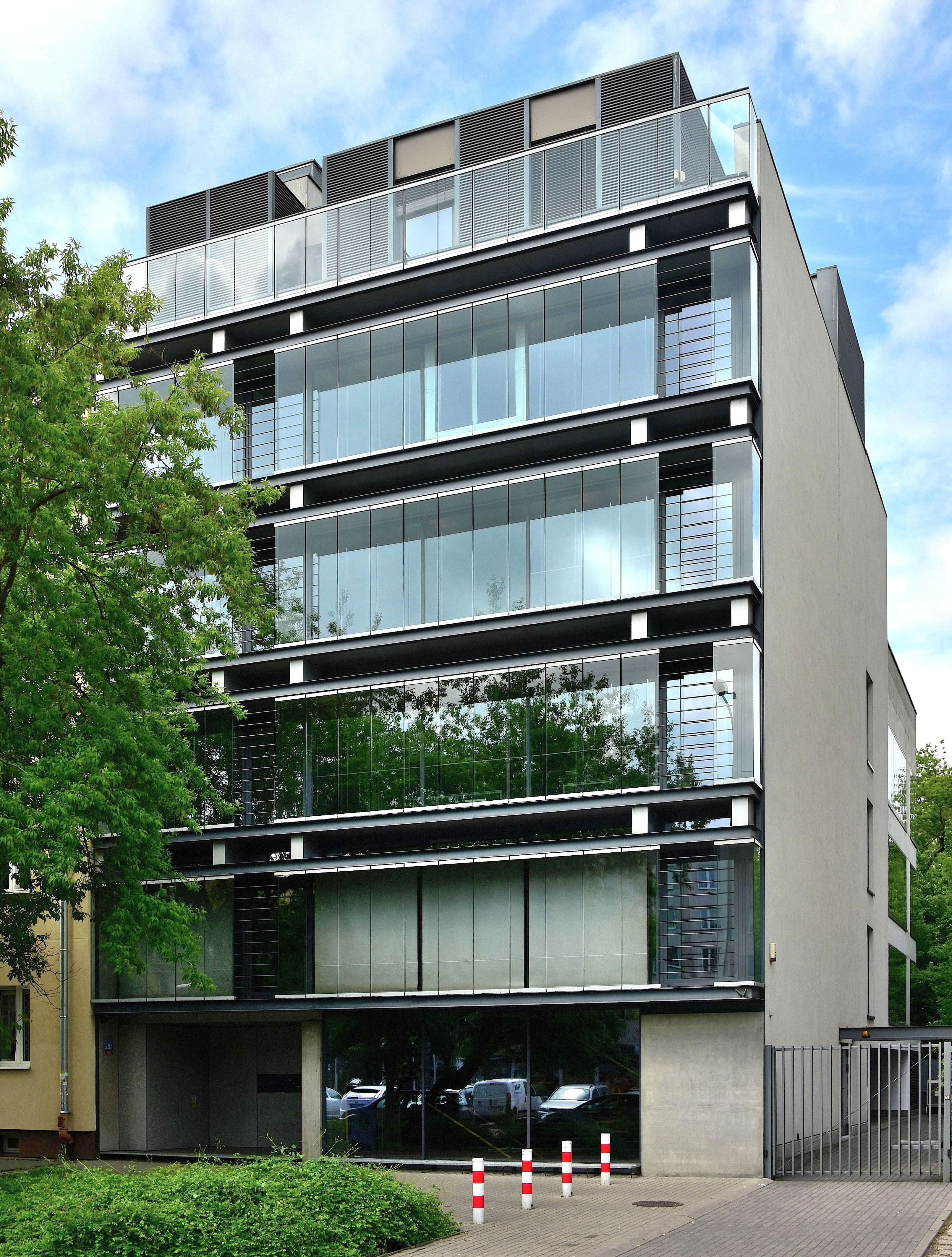 Siedziba spółki JEMS Architekci przy ul. Gagarina 28a w Warszawie